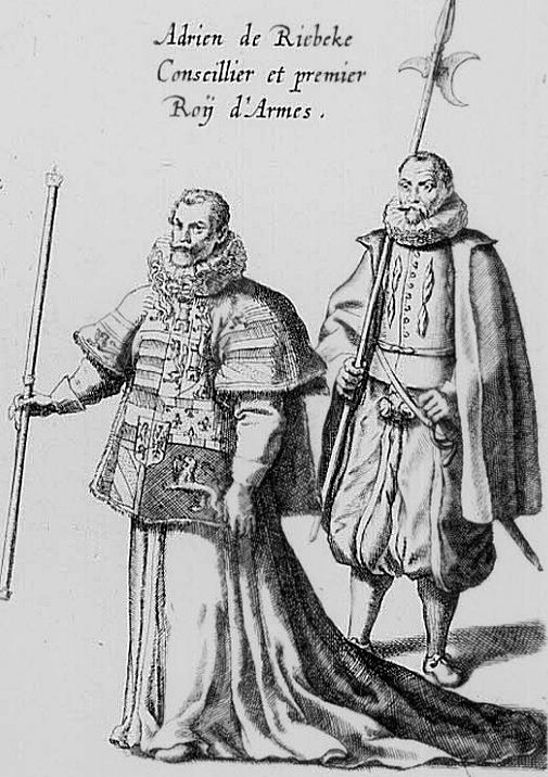 Pompes funèbres de l'archiduc Albert d'Autriche à Bruxelles / Série de 65 gravures d'un recueil relatant les funérailles d'Albert d'Autriche à Bruxelles le 11 mars 1622.